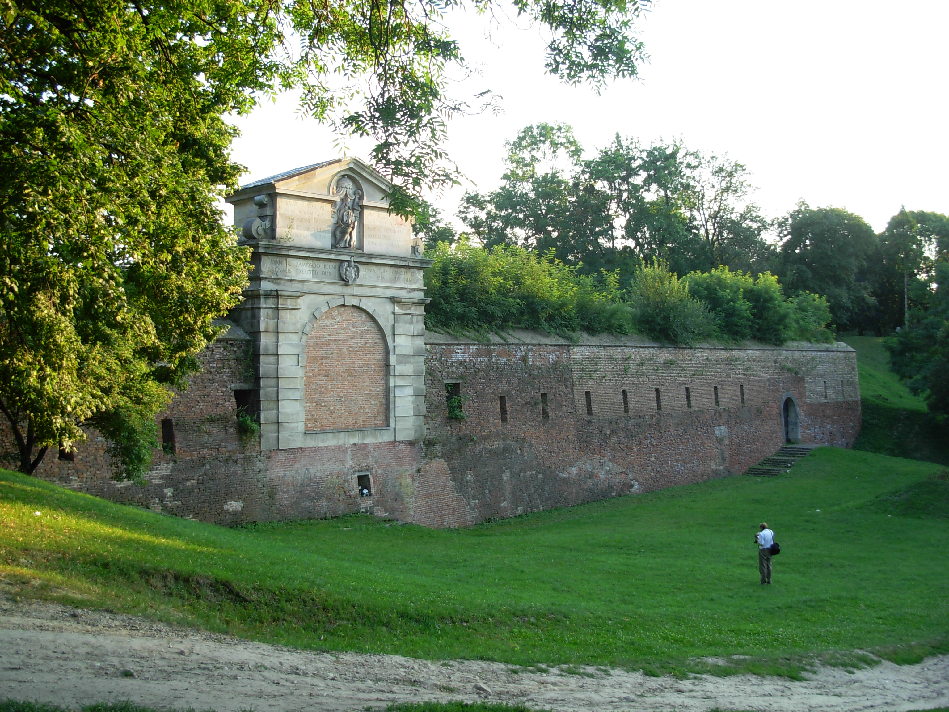 Zamość, Poland.